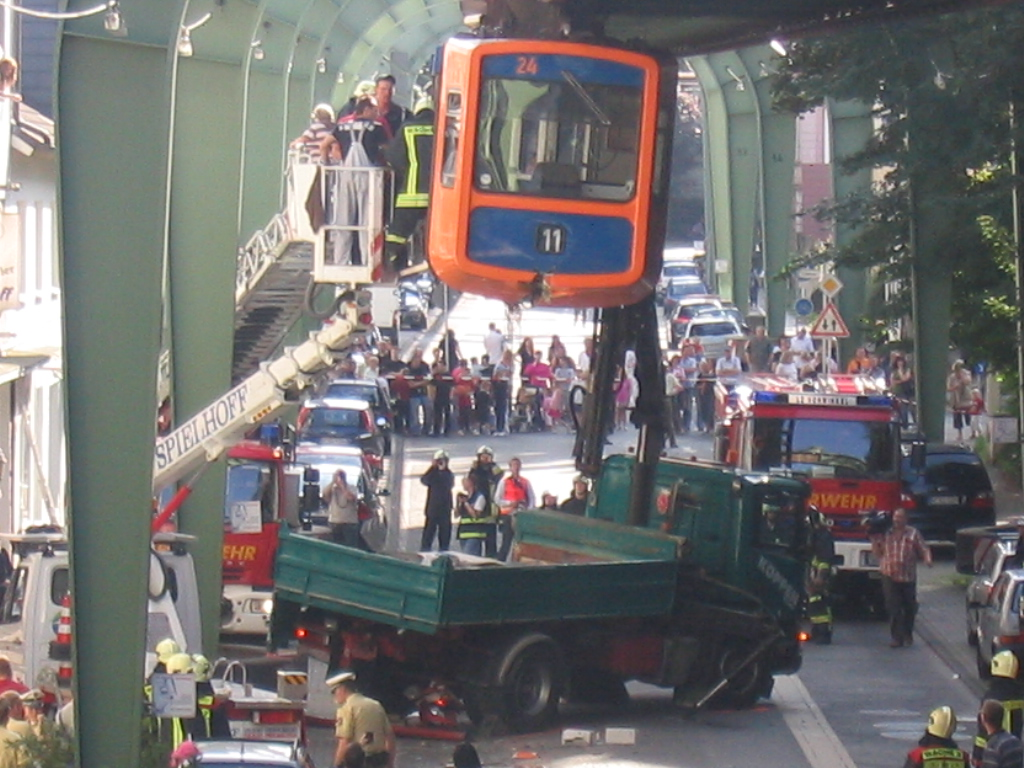 Schwebebahnunfall am 05.08.2008